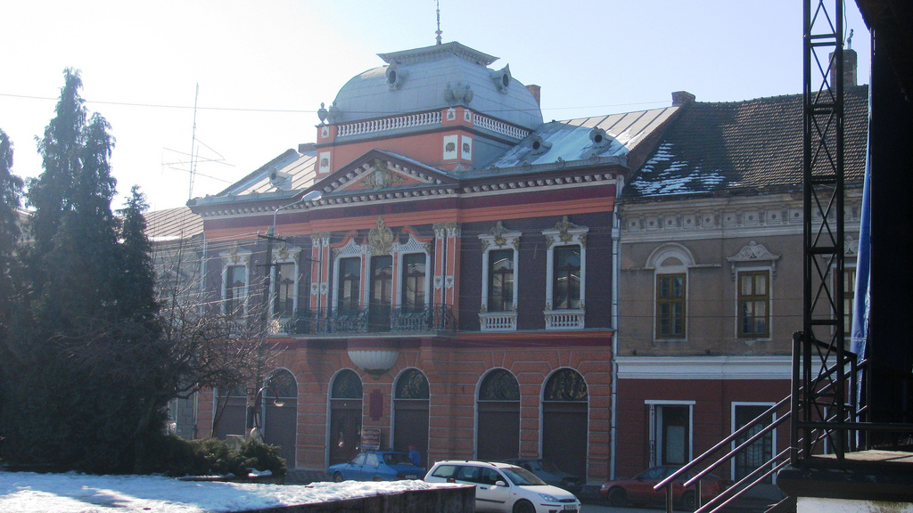 Museum in Lugoj, Romania